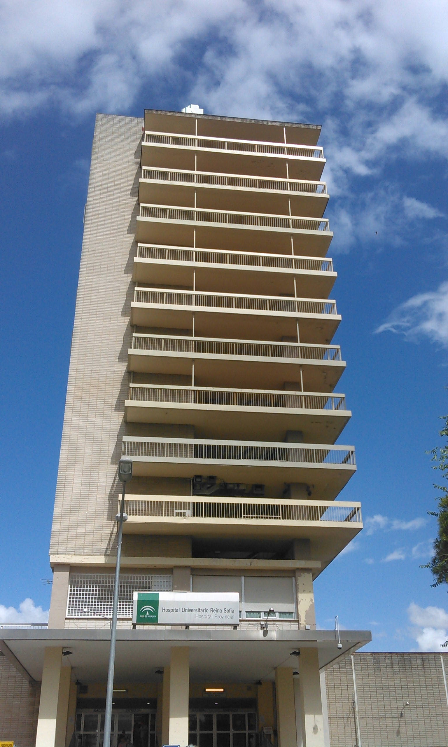 पाली pālī: Fachada Principal